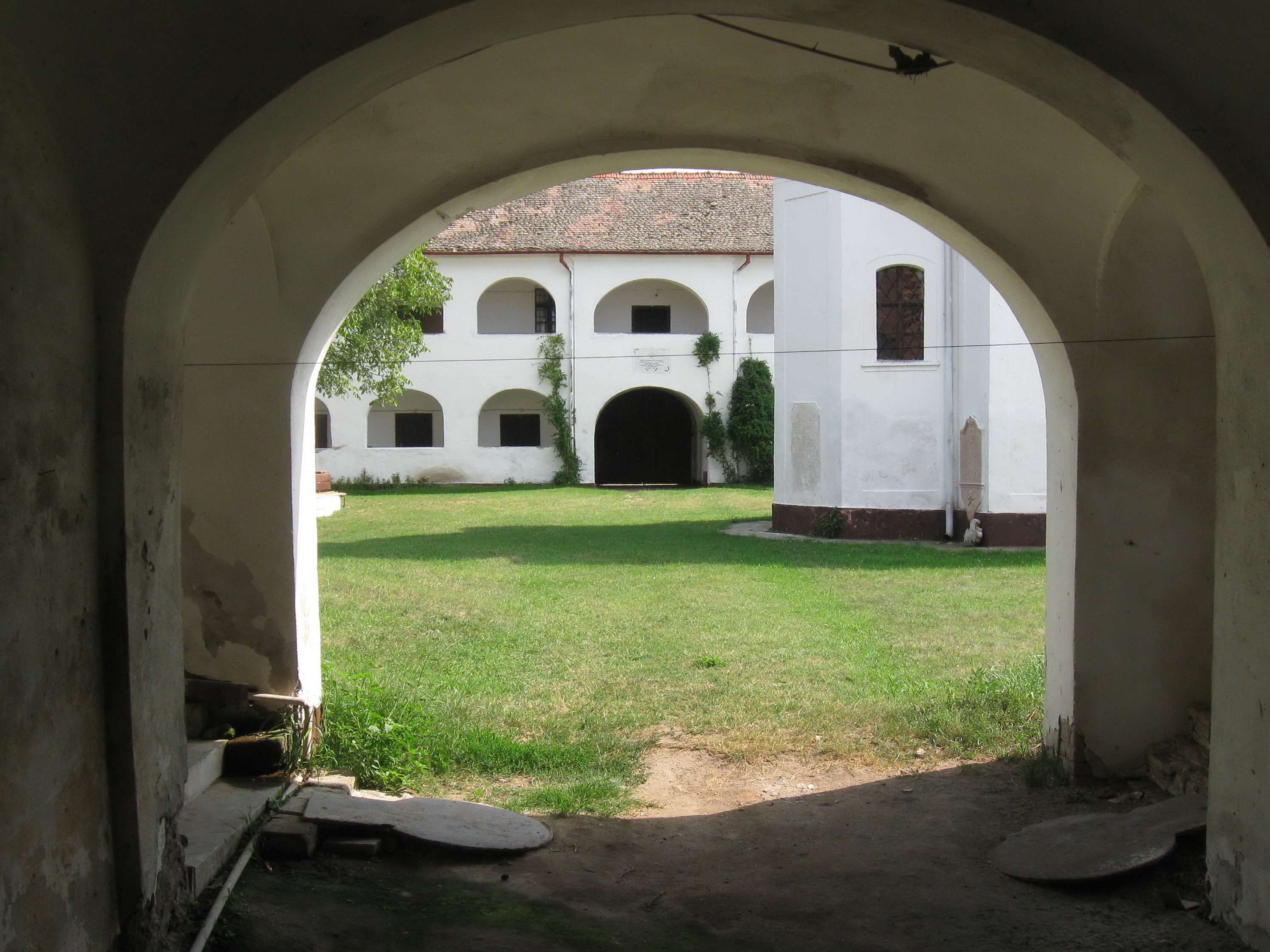 A bezdini kolostor udvara (Románia)